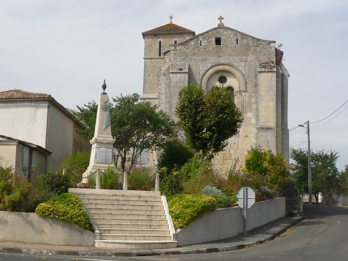 Eglise et monument aux morts de St-Georges-des-Agoûts, Charente-Maritime, France